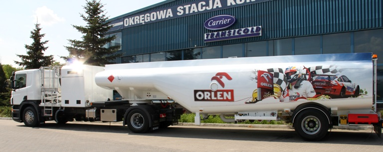 Авиационный топливозаправщик